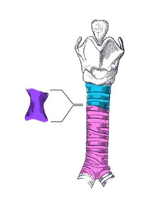 Schéma décrivant le principe d'une résection-anastomose de trachée. Source